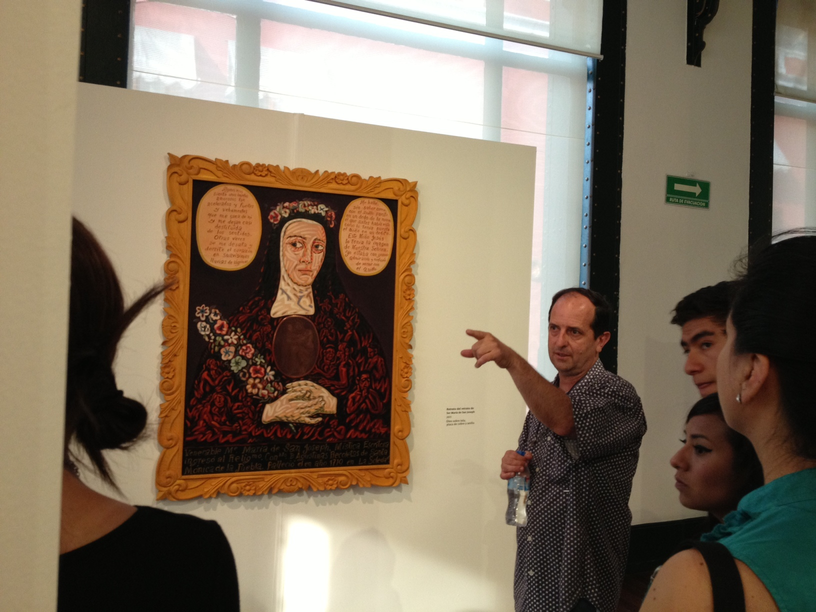 Antonio Álvarez Morán da un recorrido guiado por la exposición "Intersección cuatro" de Capillla del Arte UDLAP.